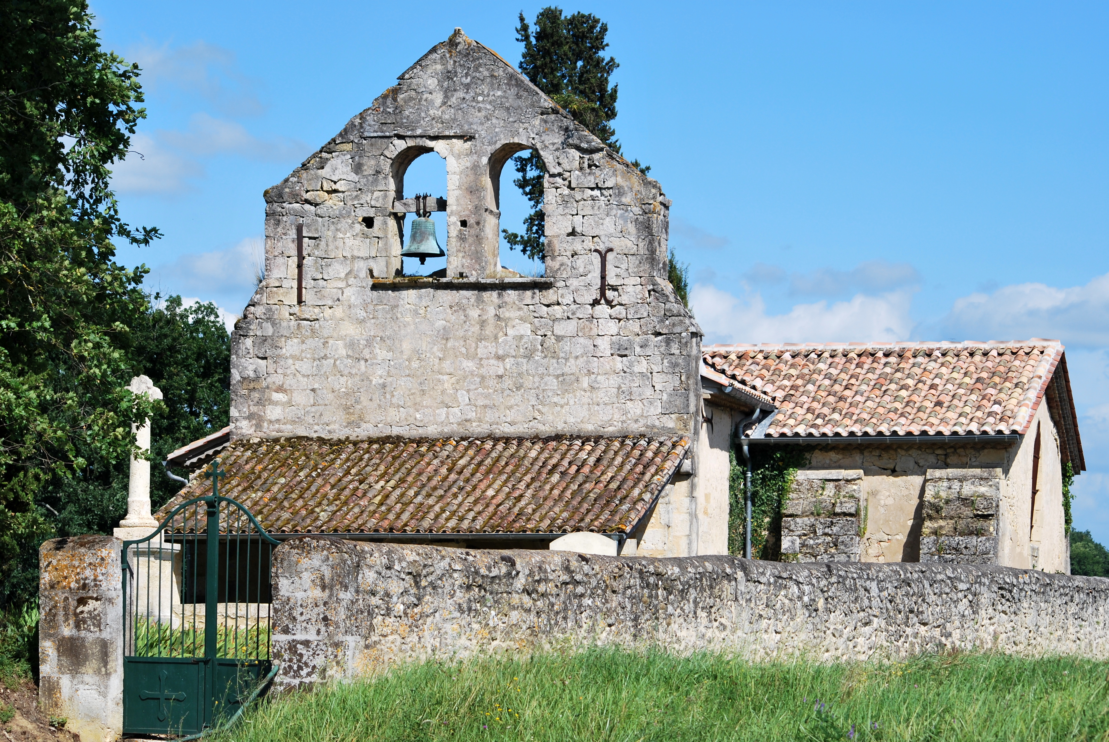 Église Saint-Laurent de Bossugan